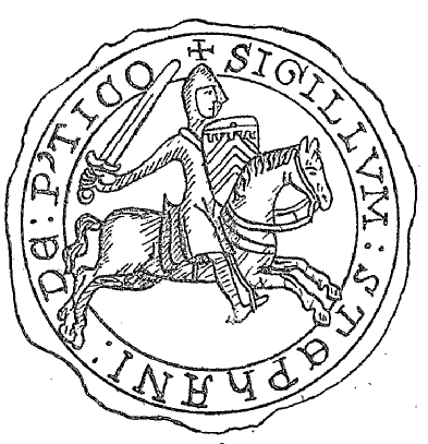 Štěpán z Perche